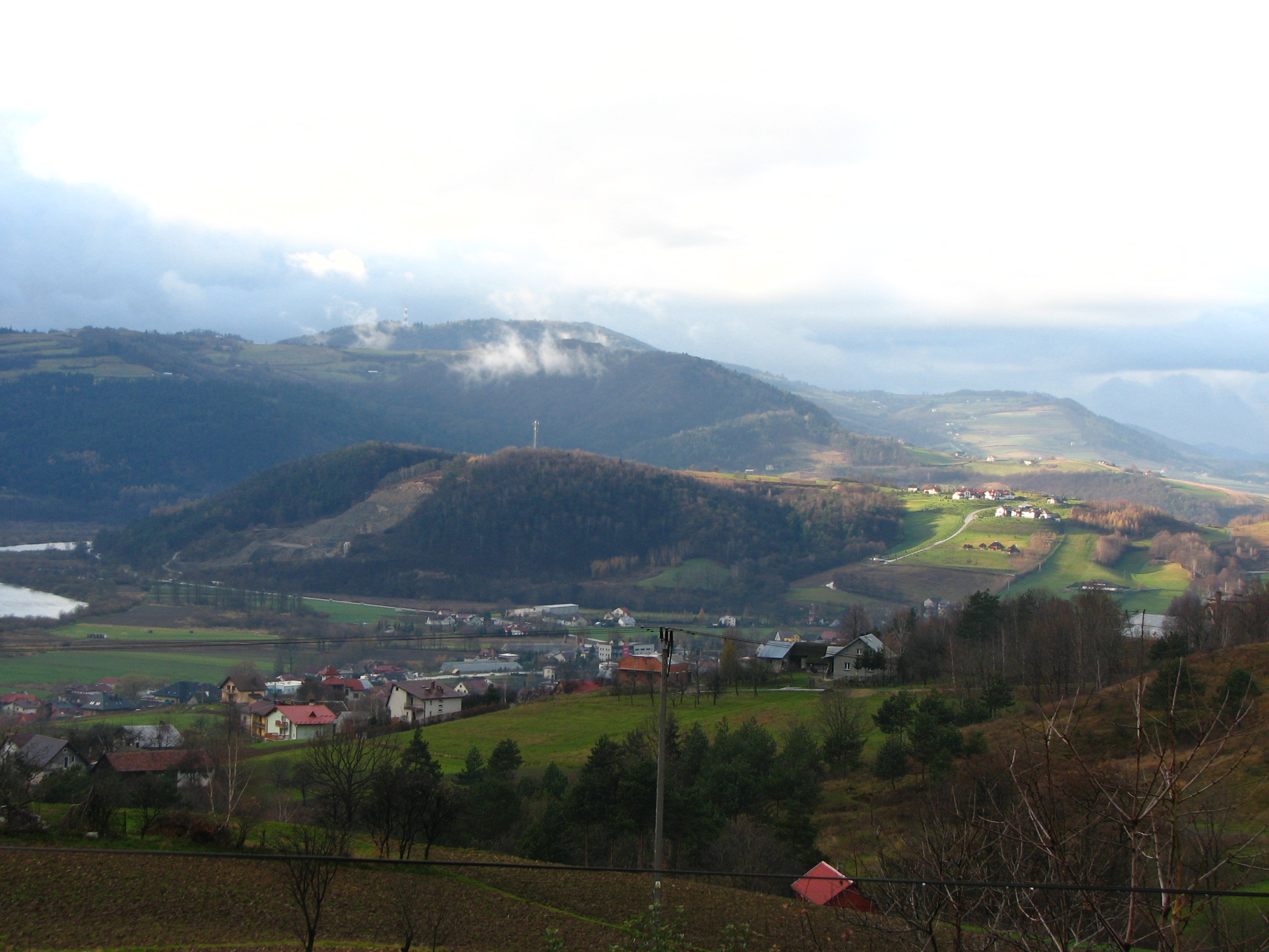 Kurowska Góra z masztem (BTS) telefonii komórkowej. U podnóża rzeka Dunajec i droga krajowa nr 75. Dalej masyw Białowodzkiej Góry a następnie góra Chełm (również z masztem antenowym).